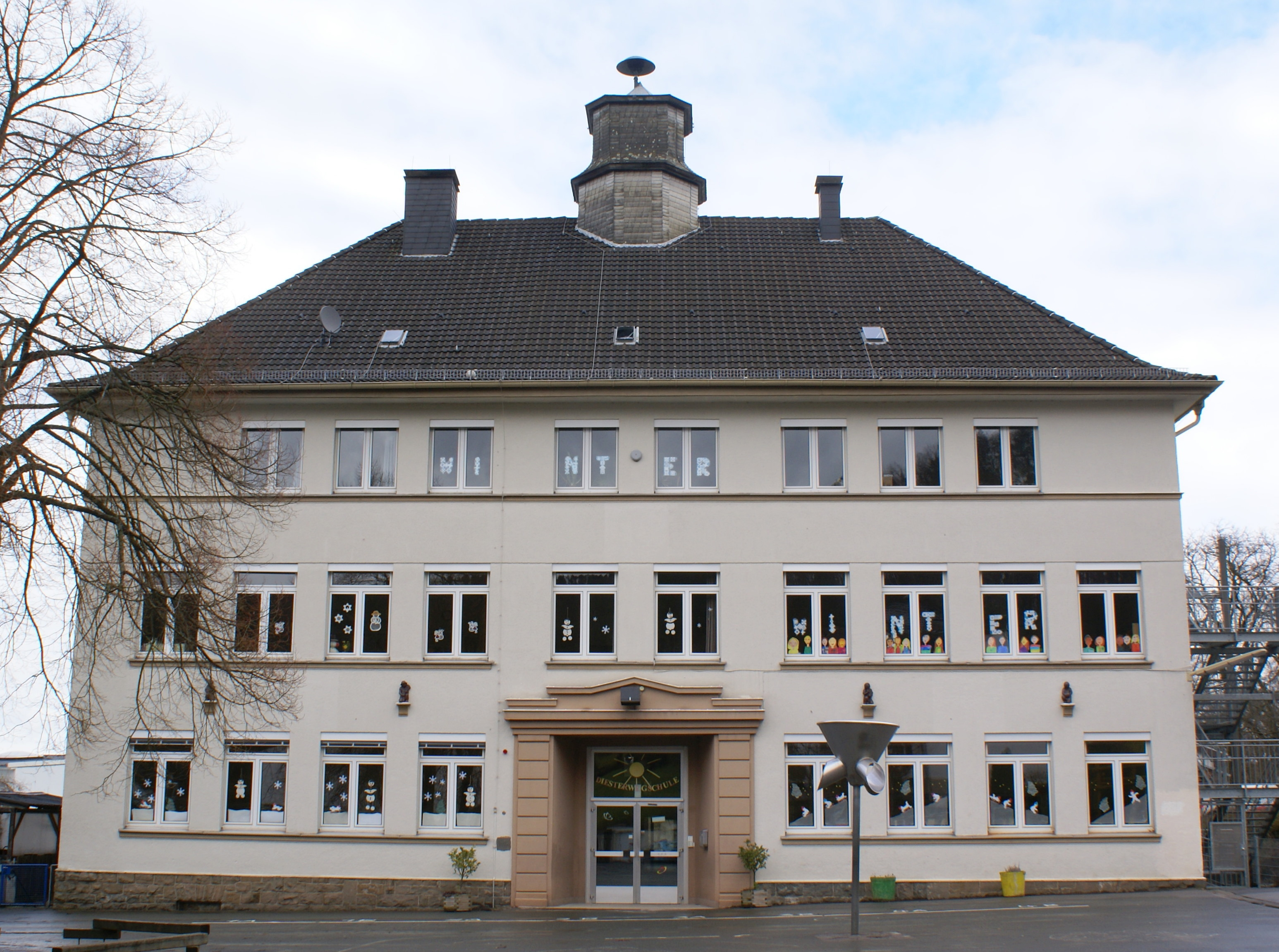 Diesterwegschule, Grundschule der Stadt Hemer in Hemer-Westig, Schulstraße 3.